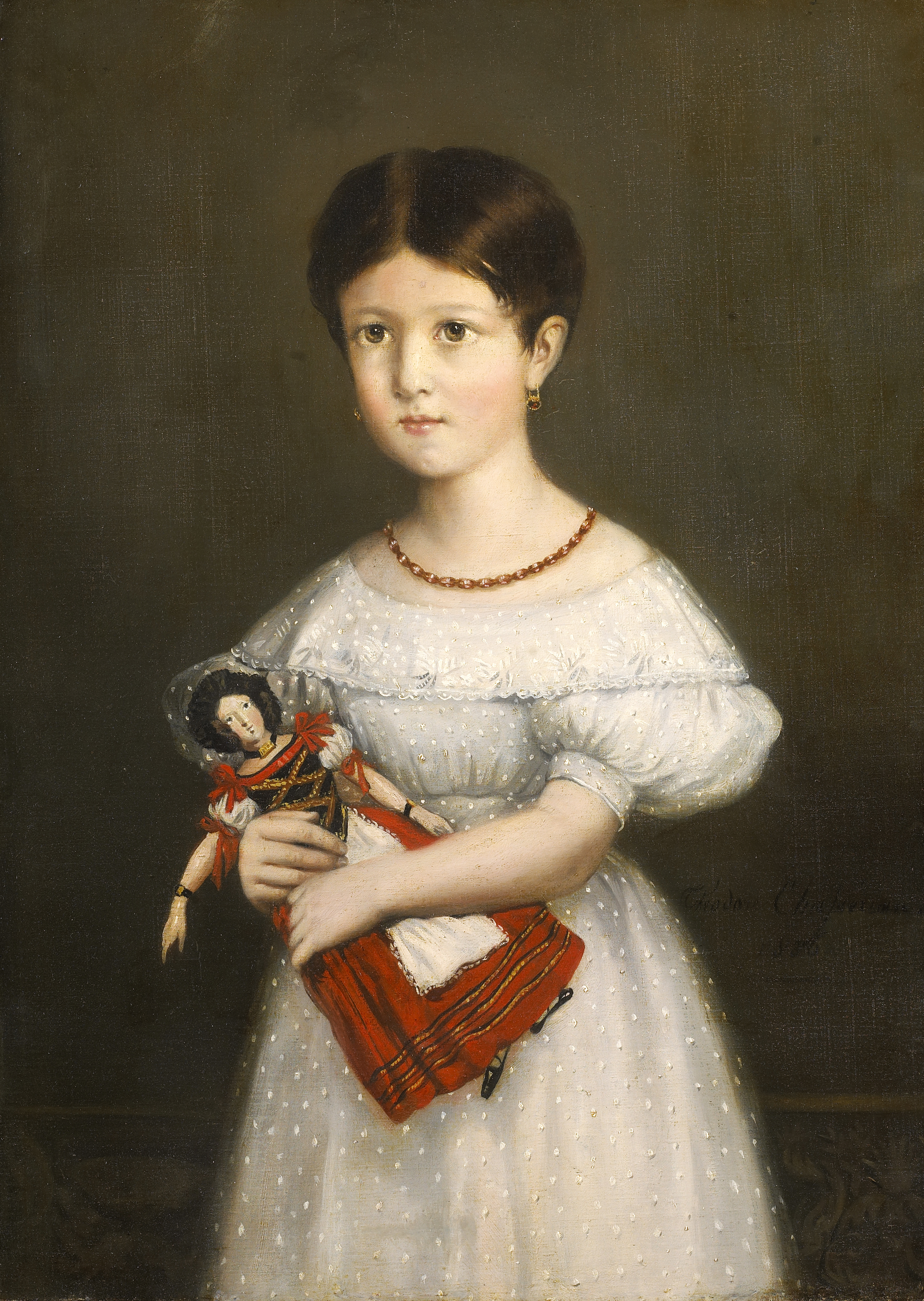 signé et daté